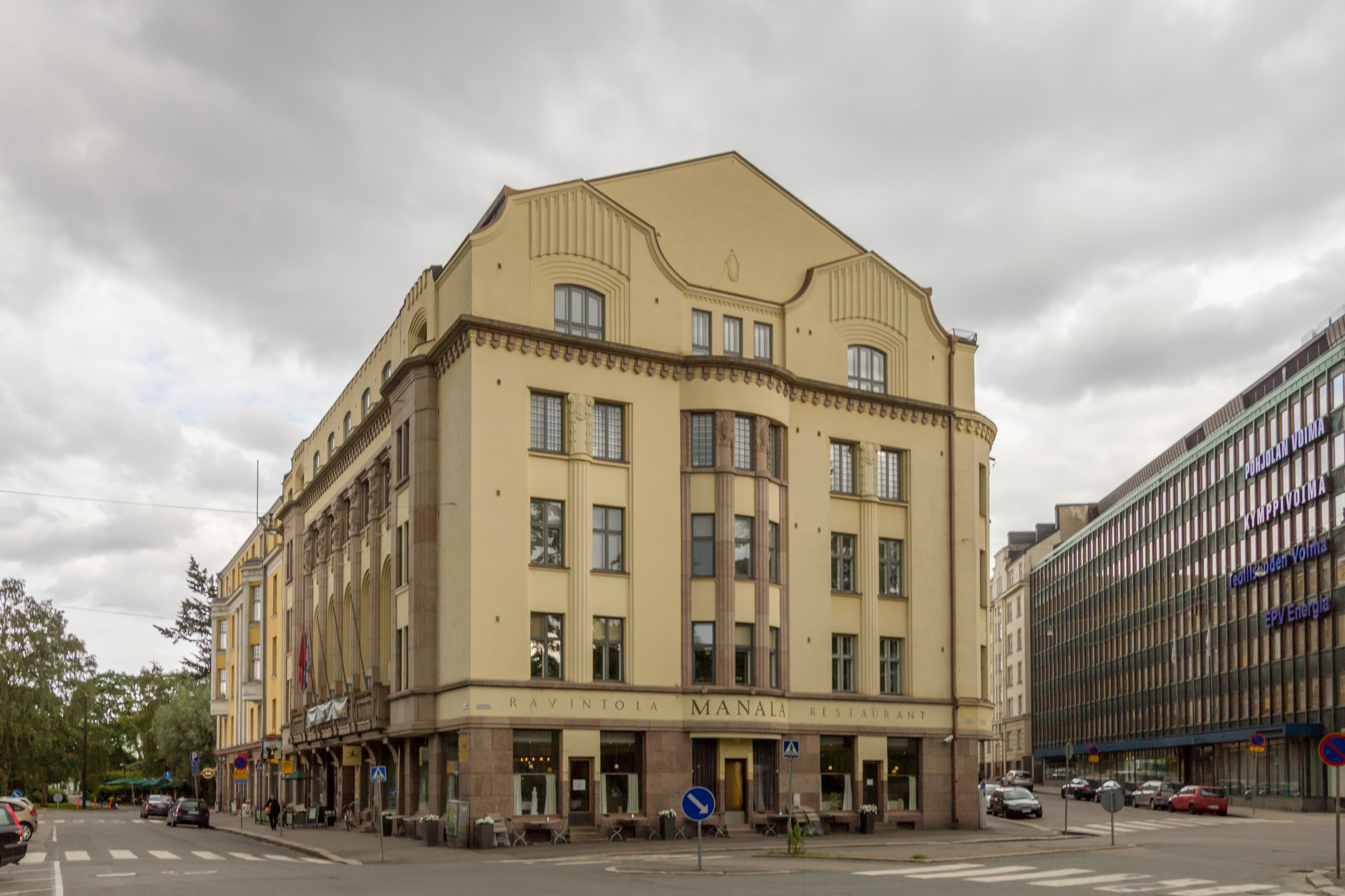 Osakuntatalo Ostrobotnia Helsingin Töölössä.